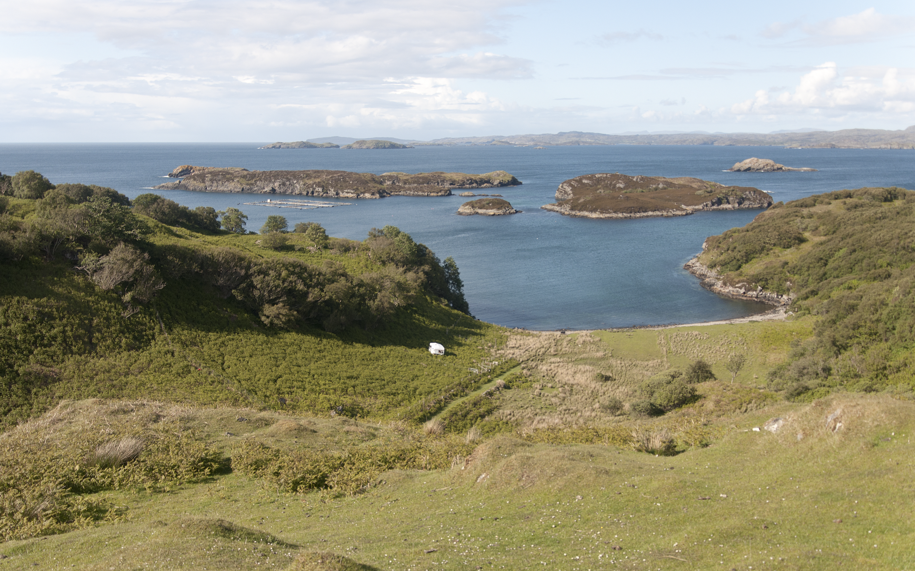 Drumbeg, Sutherland, Schotland - vanaf de B869